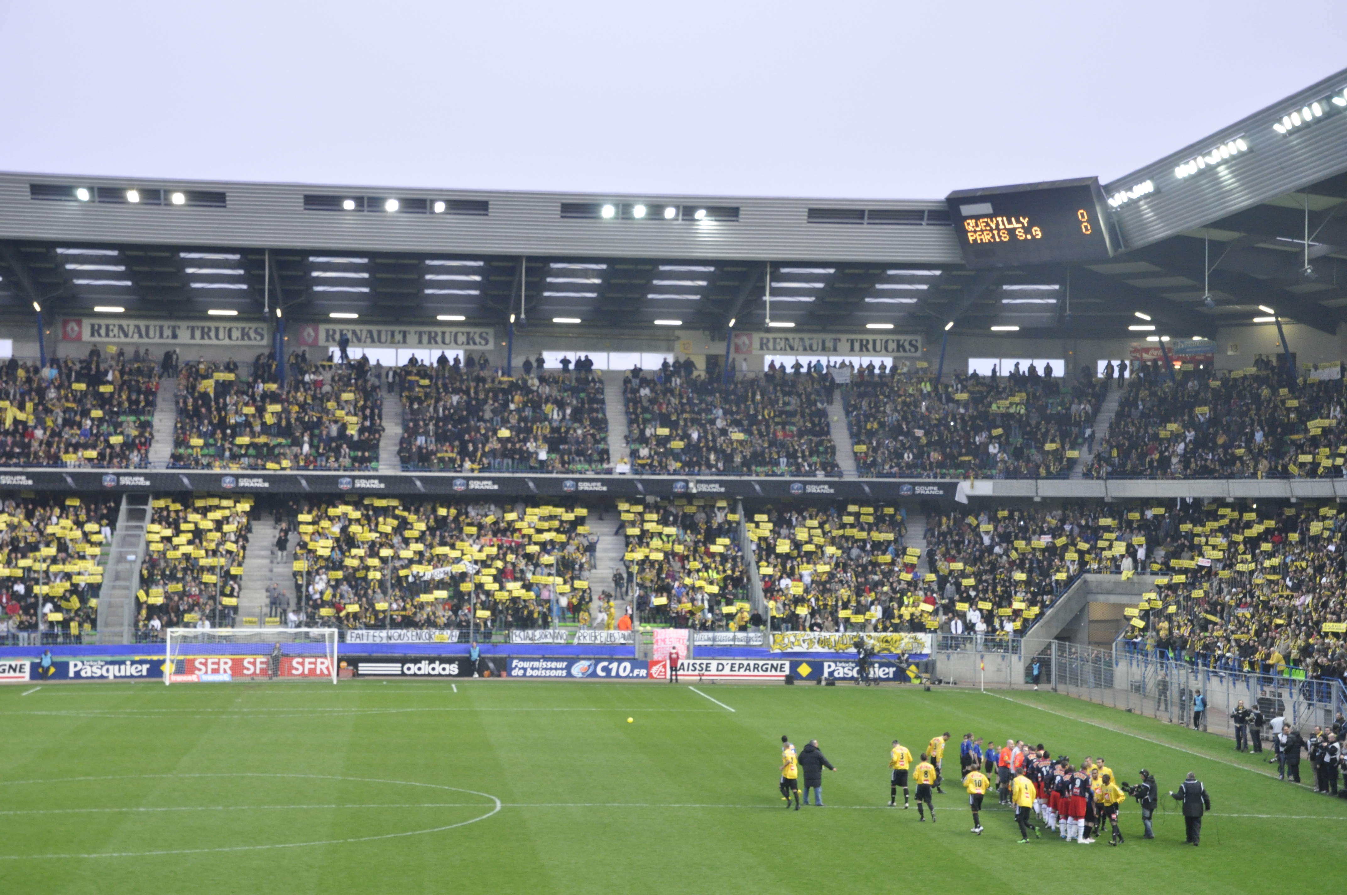 match US Quevilly - Paris SG, demi finale de la coupe de France 2009-2010